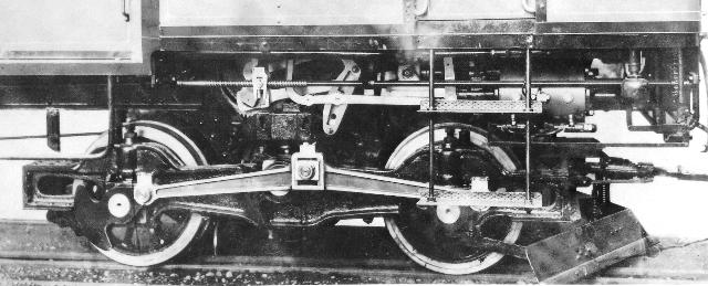 Triebdrehgestell des Dampftriebwagens CFm 2/4 Nr. 1 der Biel-Meinisberg-Bahn